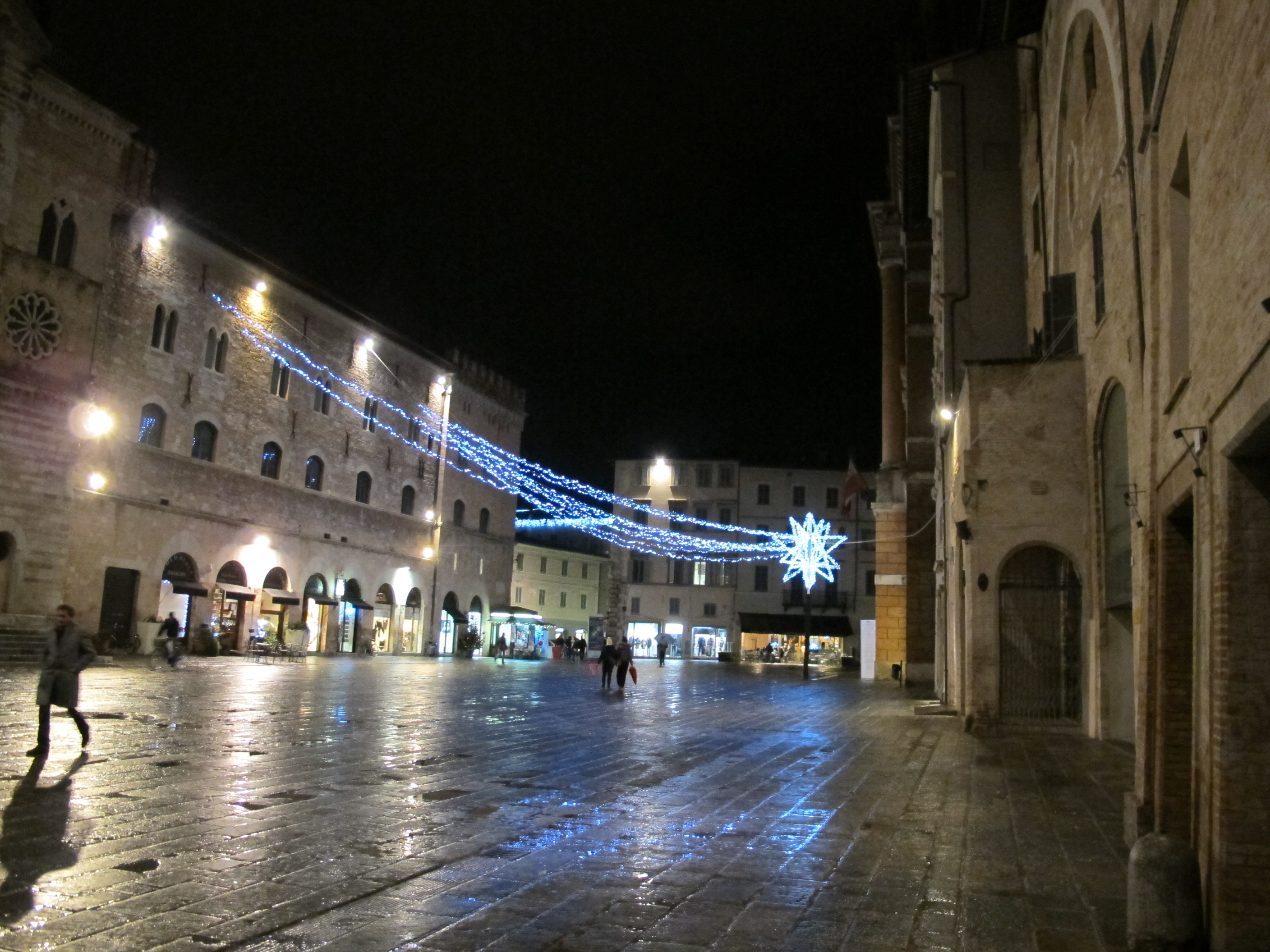 Foligno, piazza della repubblica